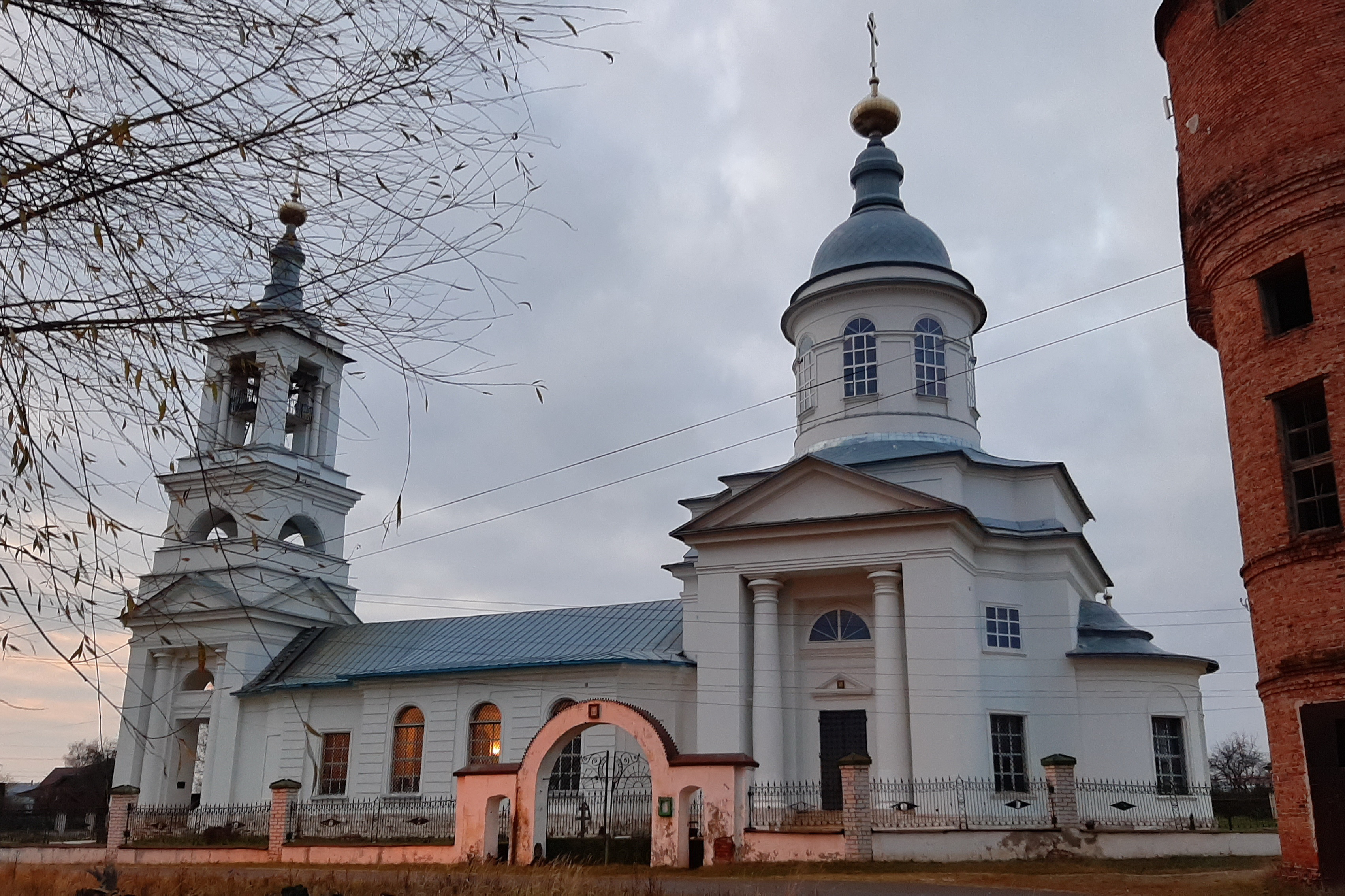 Церковь Троицы Живоначальной с интерьером: улица Советская площадь, 73, Досчатое, Выксунский район, Нижегородская область